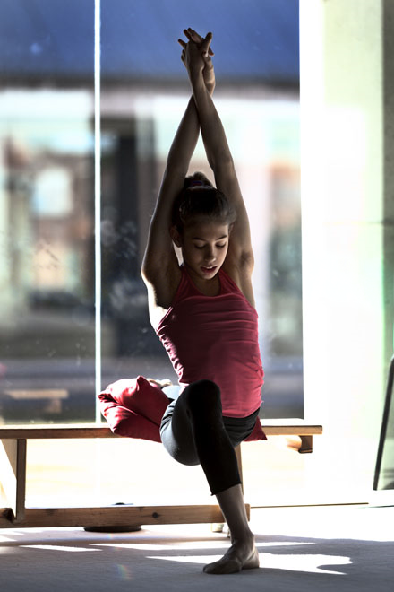 La gimnasta rítmica española Clara Esquerdo en el CAR de San Cugat en febrero de 2013.